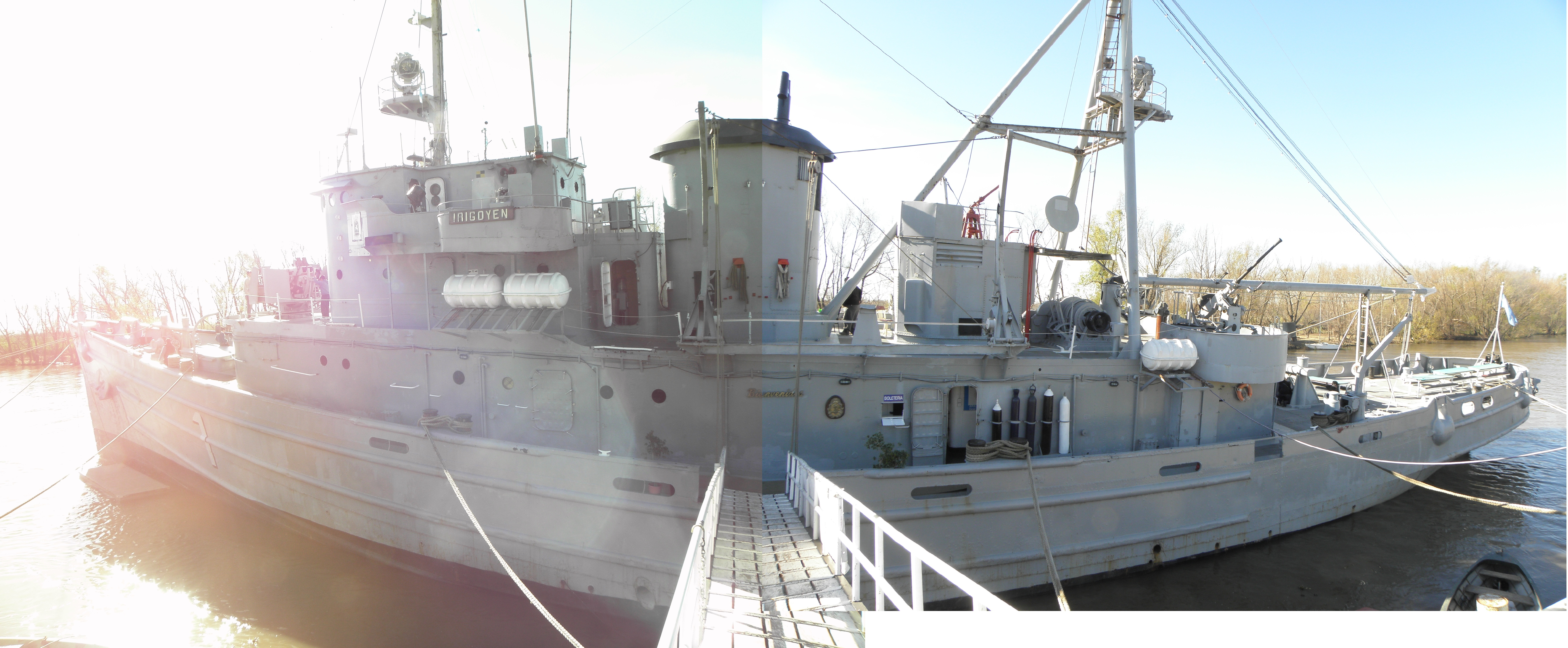 Barco de Guerra de la Armada Argentina, ya retirado, transformado en buque-museo: ARA Comandante General Irigoyen (A-1), en la ribera de la ciudad de San Pedro, Provincia de Buenos Aires, Argentina.